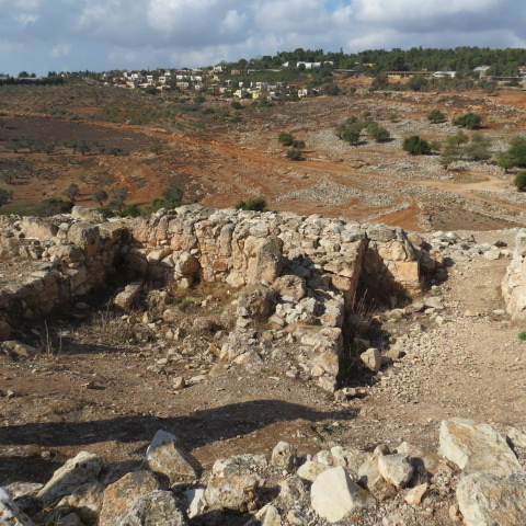 חומת סוגרים ביודפת העתיקה מול יודפת החדשה